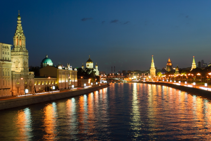 2012, июль